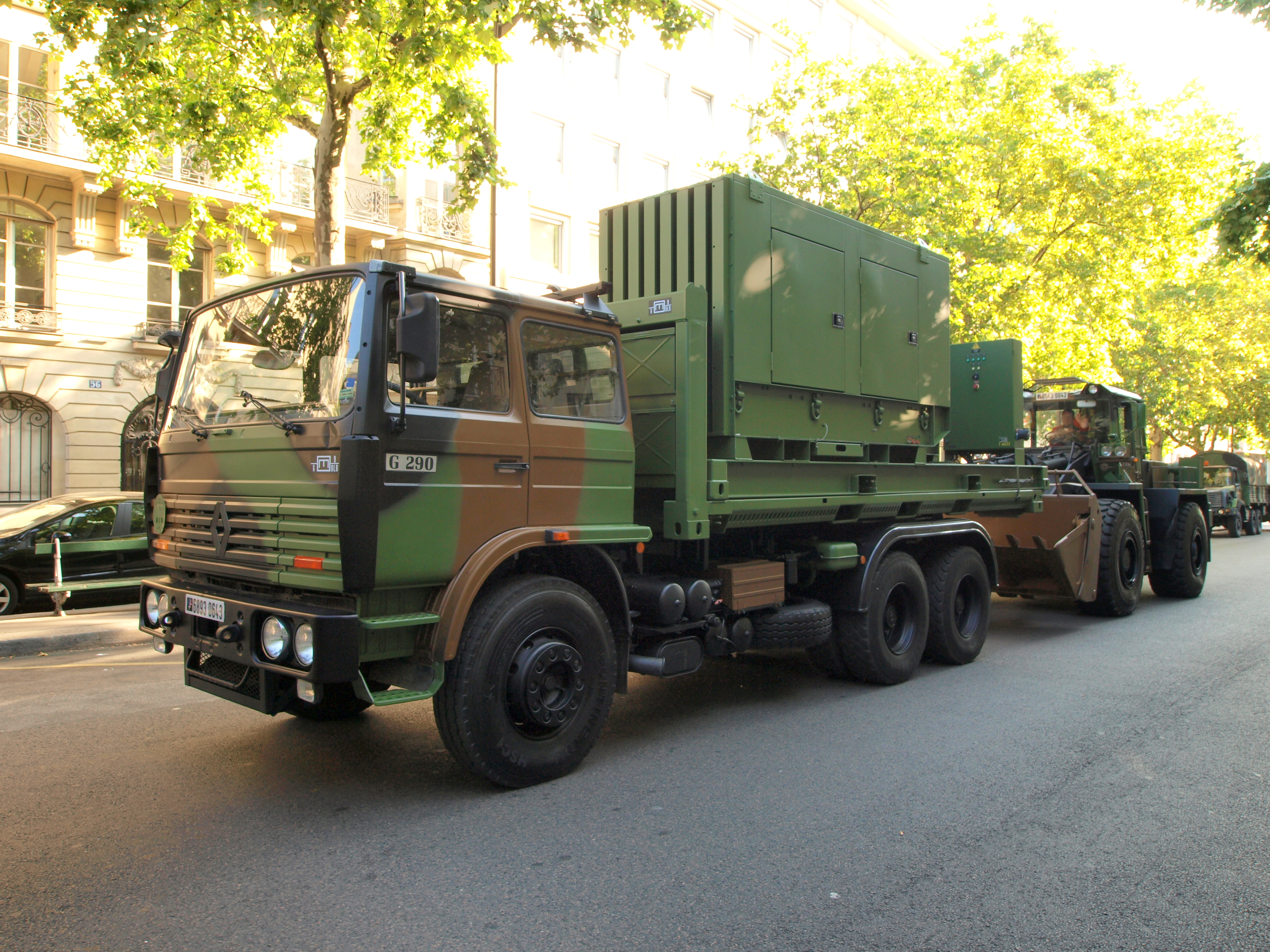 VTL (Véhicule de transport logistique) Renault G290 et un tractopelle du 6e régiment du génie .